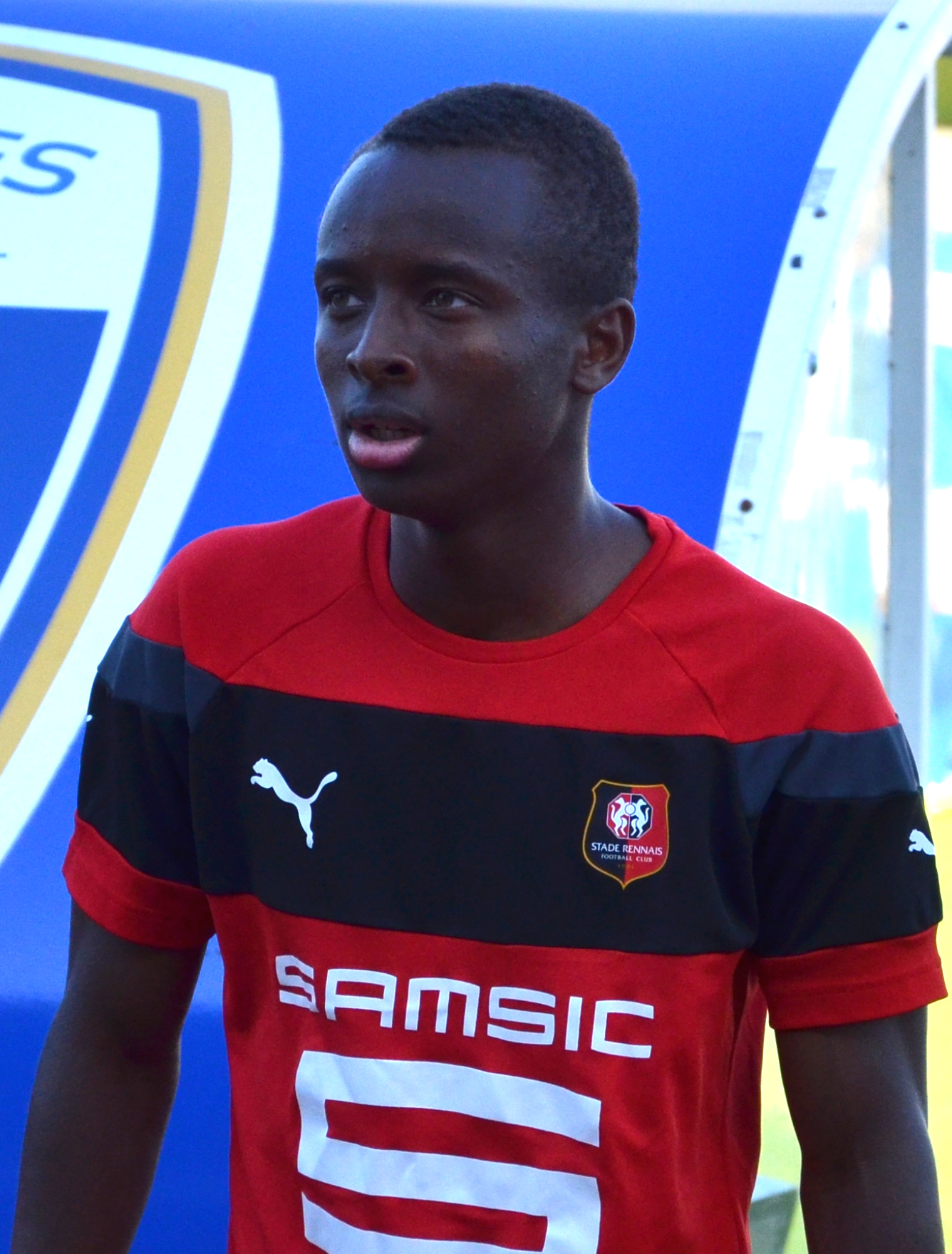 Photographie prise lors du match opposant le Stade rennais à l'US Avranches en match amical au stade René-Fenouillère d'Avranches le 30 août 2016. Ici, Stéphane Diarra.